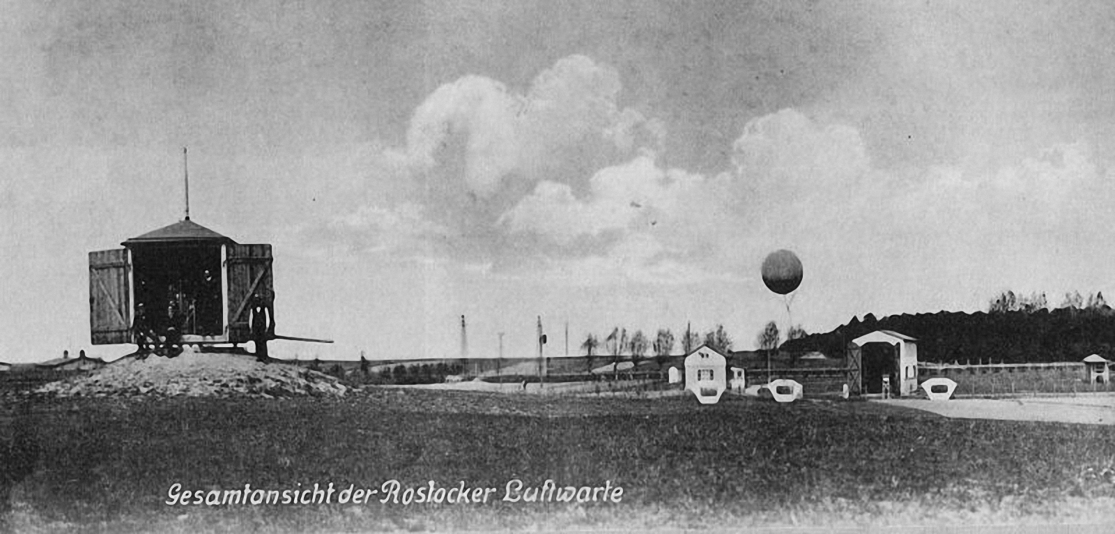 Rostock Luftwarte Friedrichshöhe Gesamtansicht